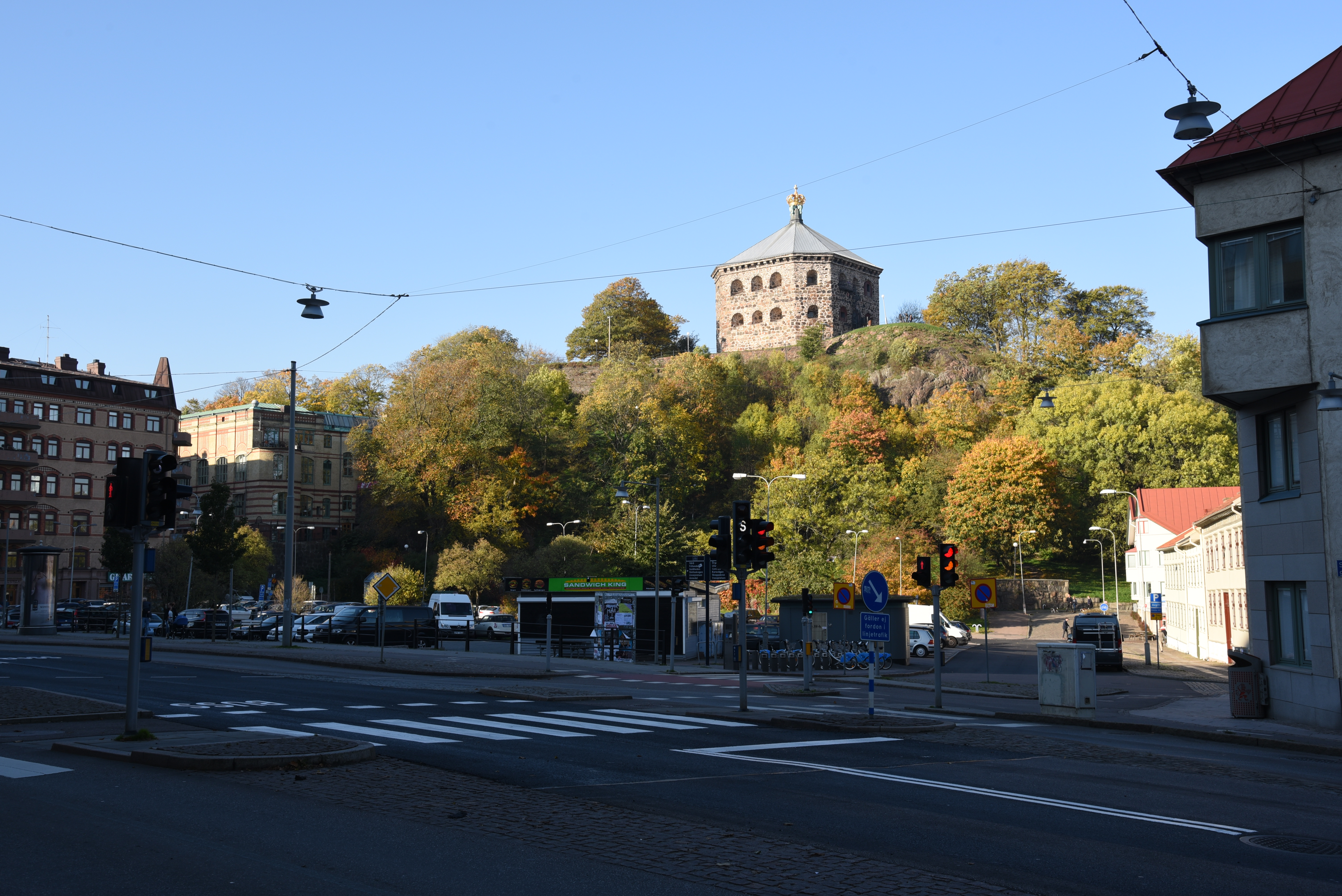 Skanstorget i stadsdelarna Haga, Kommendantsängen och Annedal i Göteborg. I fonden Skansen Kronan på Risåsberget.